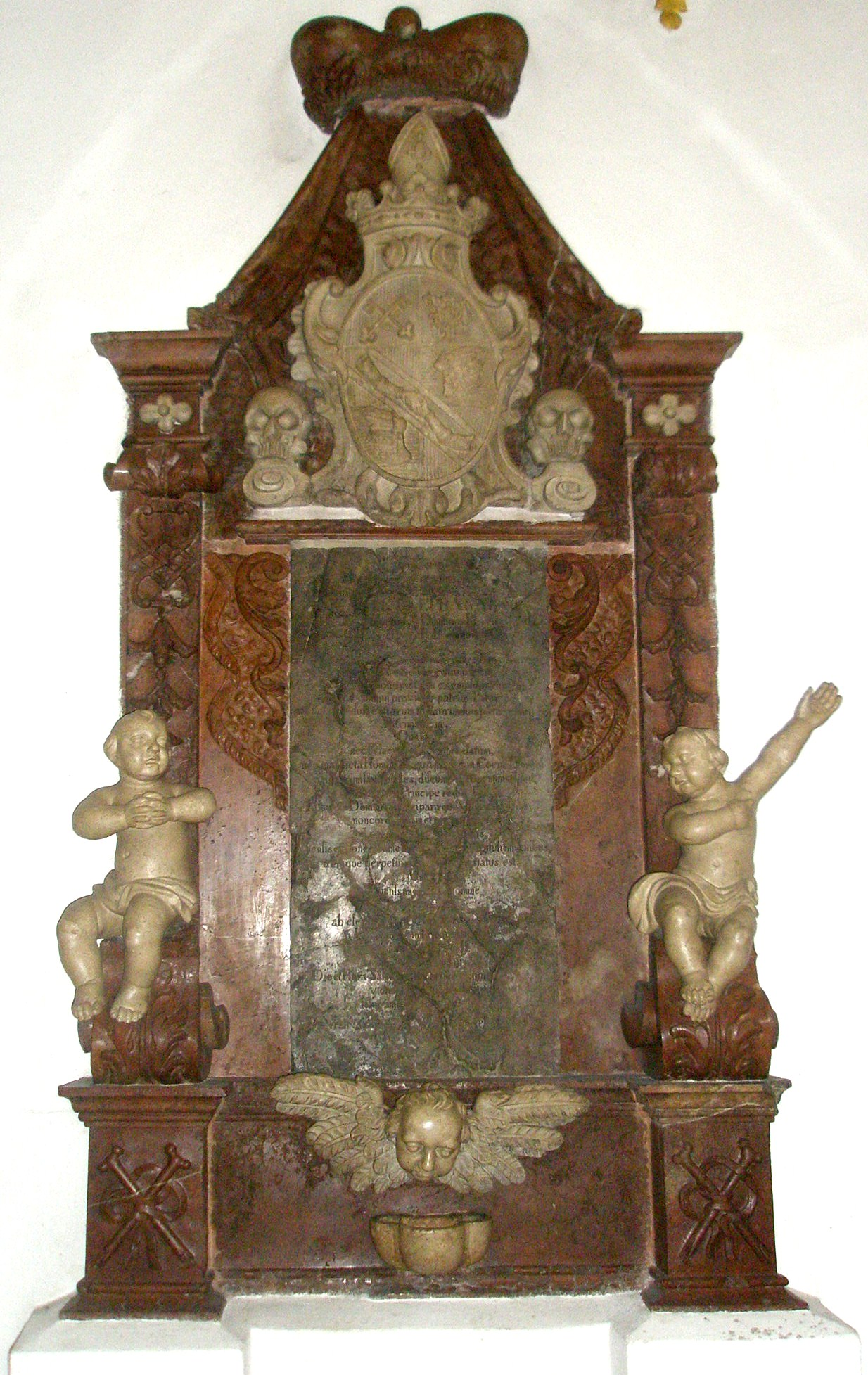 Grabdenkmal von Michael Balthasar von Christalnigg († 1768) in der Stiftskirche Berchtesgaden